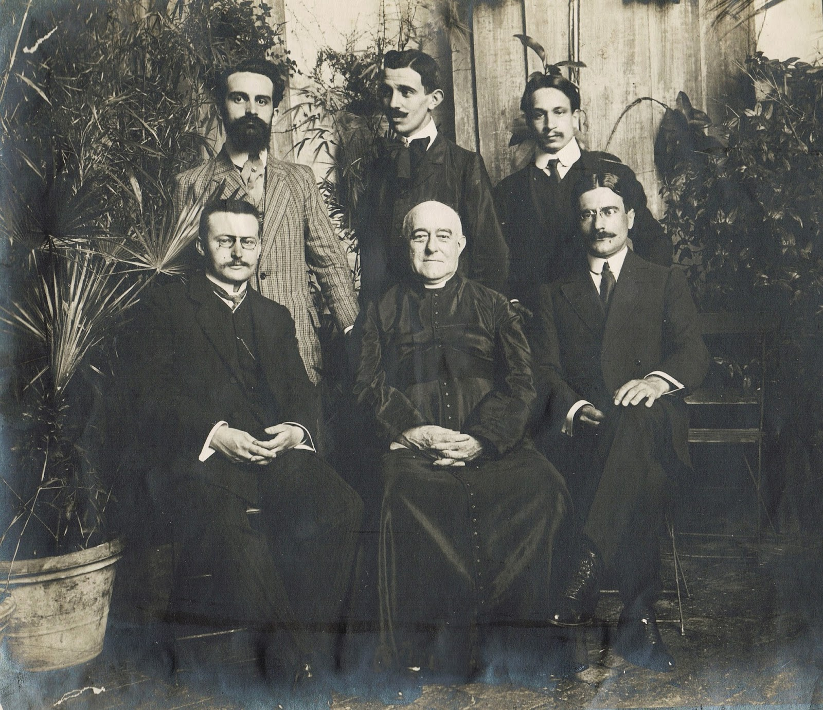 Louis Duchesne, avec des élèves de l'École française de Rome. Assis à gauche ː Alain de Boüard. Photographie prise au plus tard en 1913 (fin du séjour de Boüard à Rome).